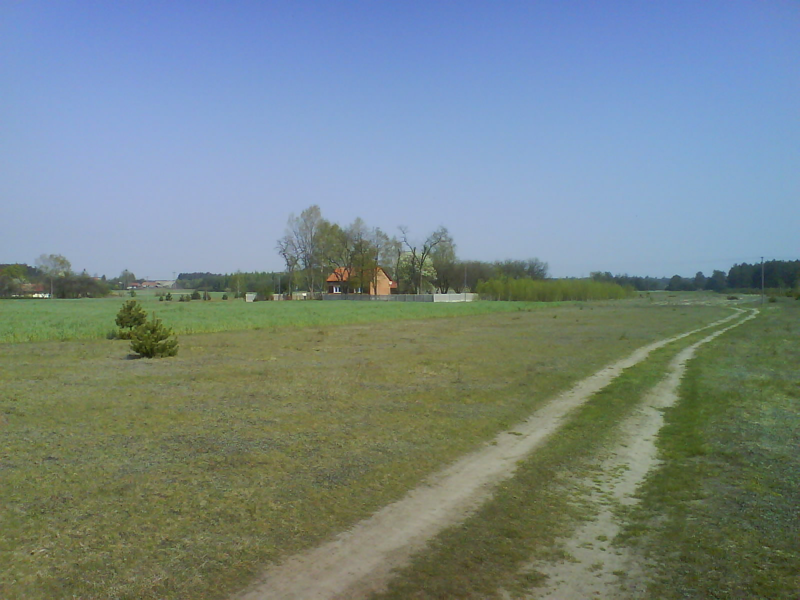 Czepiec